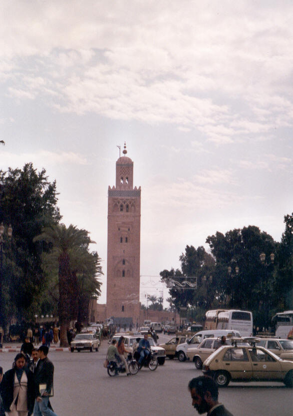 Minaret de la Koutoubia (la bibliotèque) de Marrakech